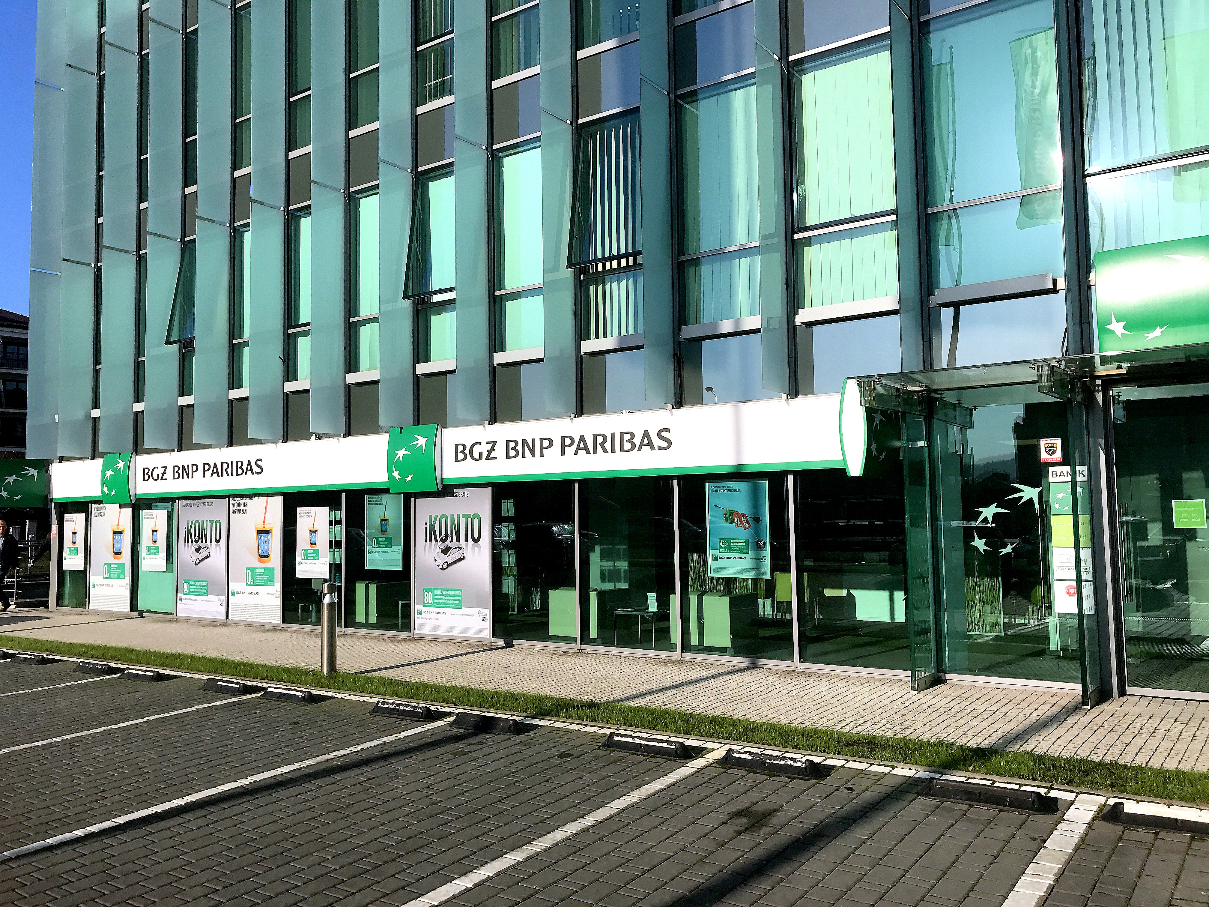 Oddział BGŻ BNP Paribas w Krakowie przy ul. Armii Krajowej